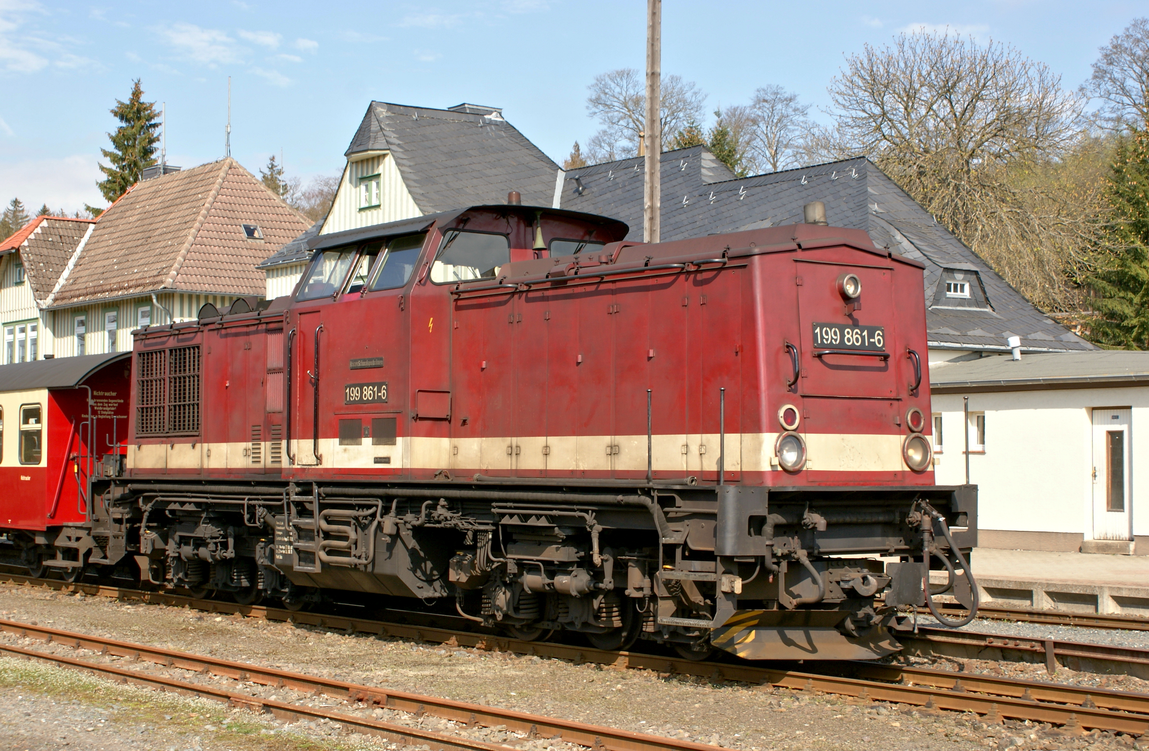 Diesellokomotive 199 861 (Umbau aus 110 861) C´C´dh in Elend am 27.April 2012